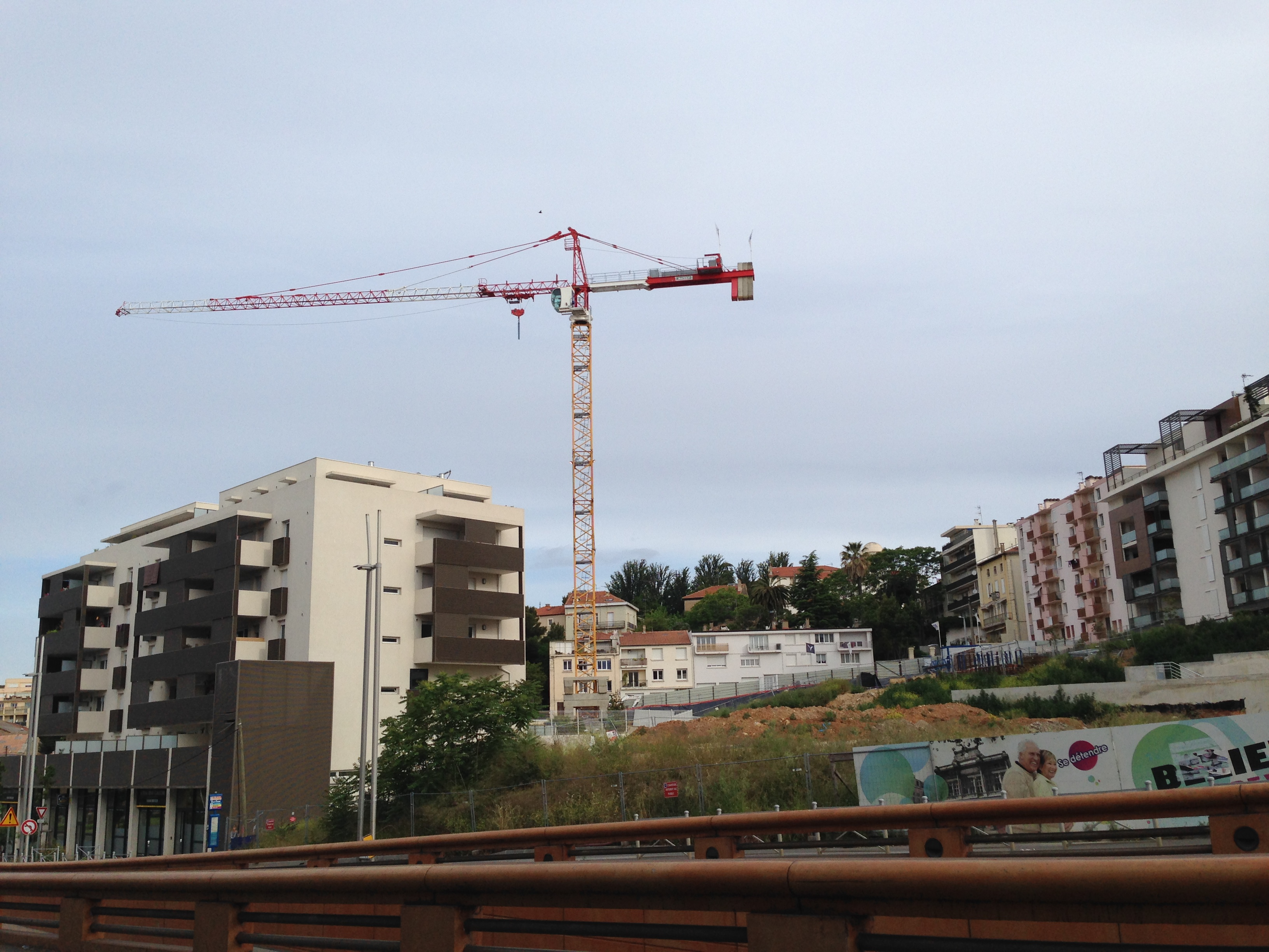 un chantier à Béziers